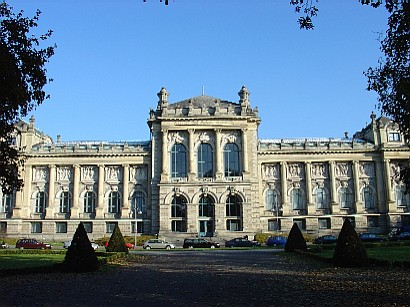 Nds. Landesmuseum Hannover - Autor: Bregoan67 - copyfree (Original text: NiedersÃ¤chsisches Landesmuseum Hannover) Aufnahmejahr: 2003 Andere Versionen: Keine (fÃ¼r die GNU FDL)